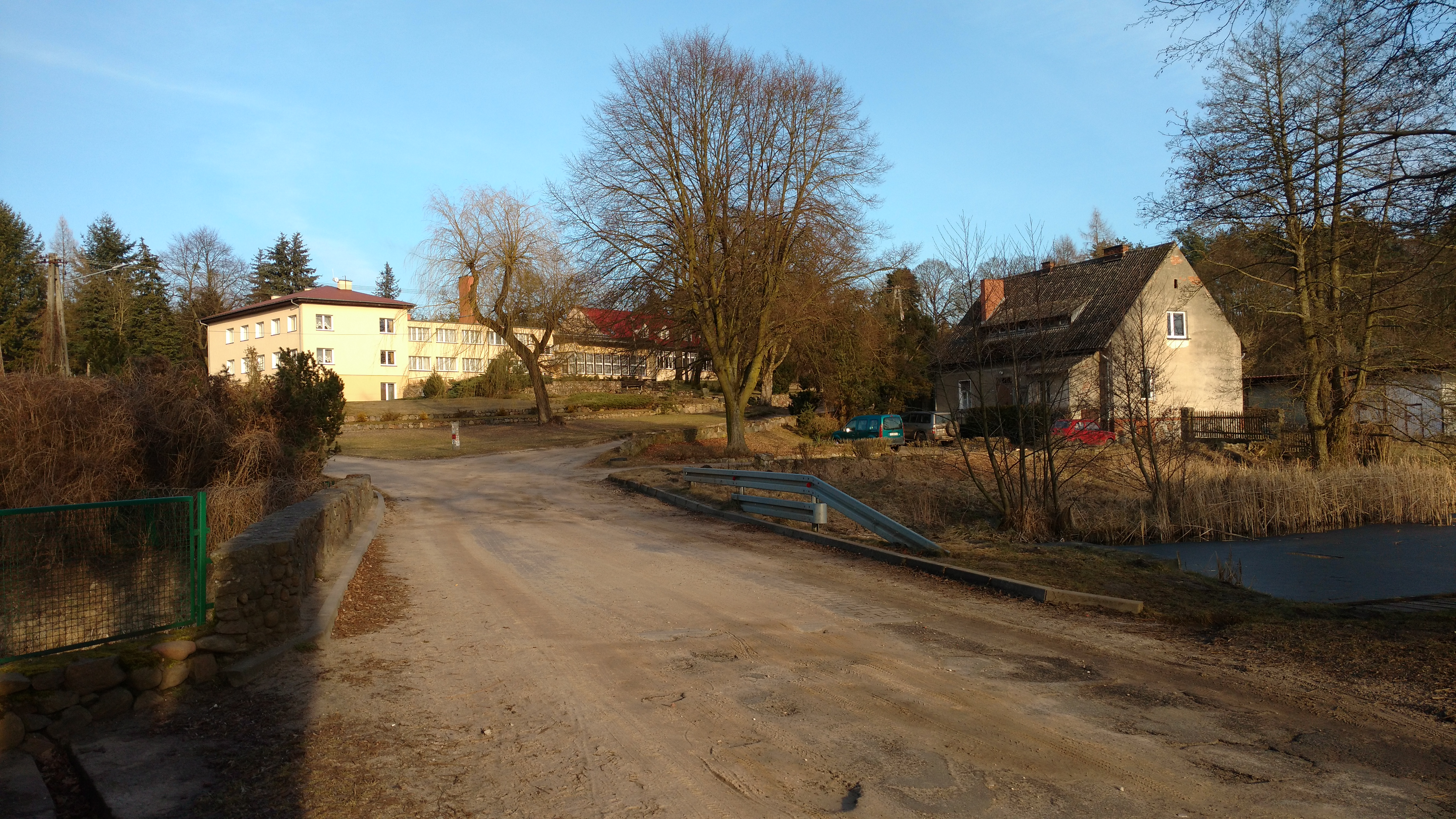 Widok na wieś